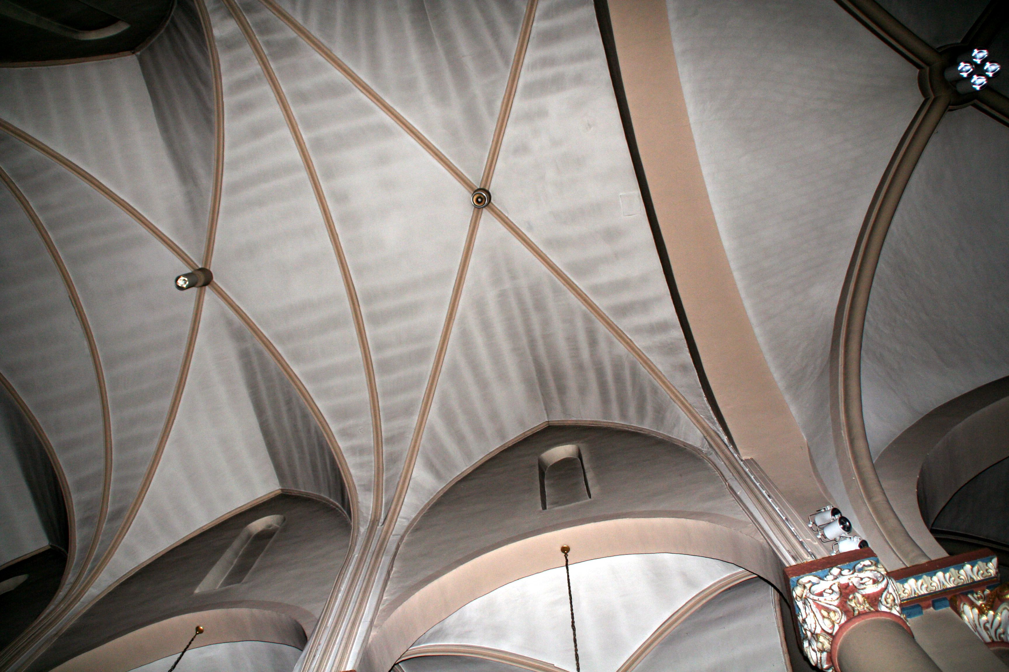 Péitenger Kierch Plafong. Peiteng